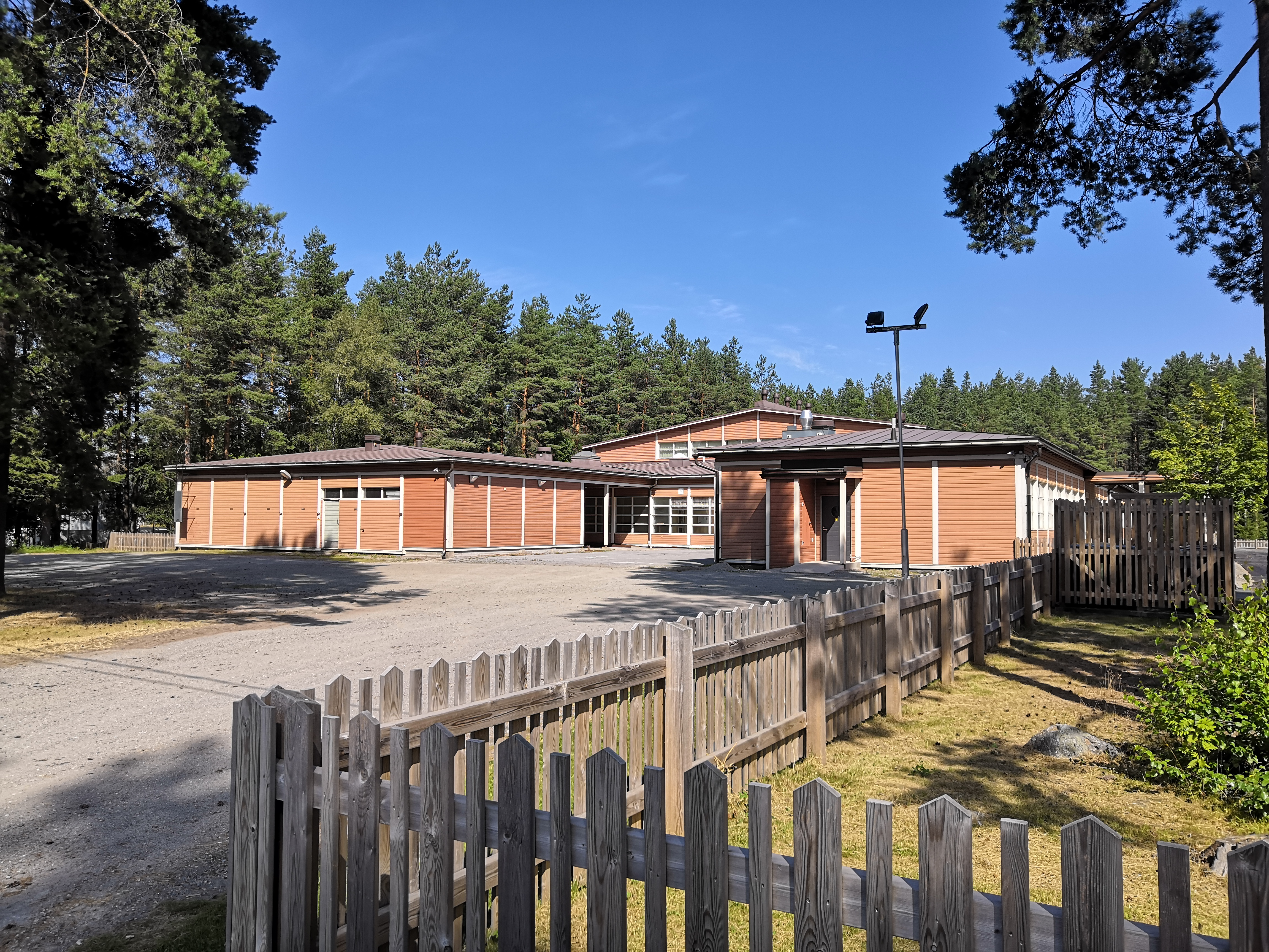 Itälän koulu. Ollut käytössä vuodesta 1973 lähtien.